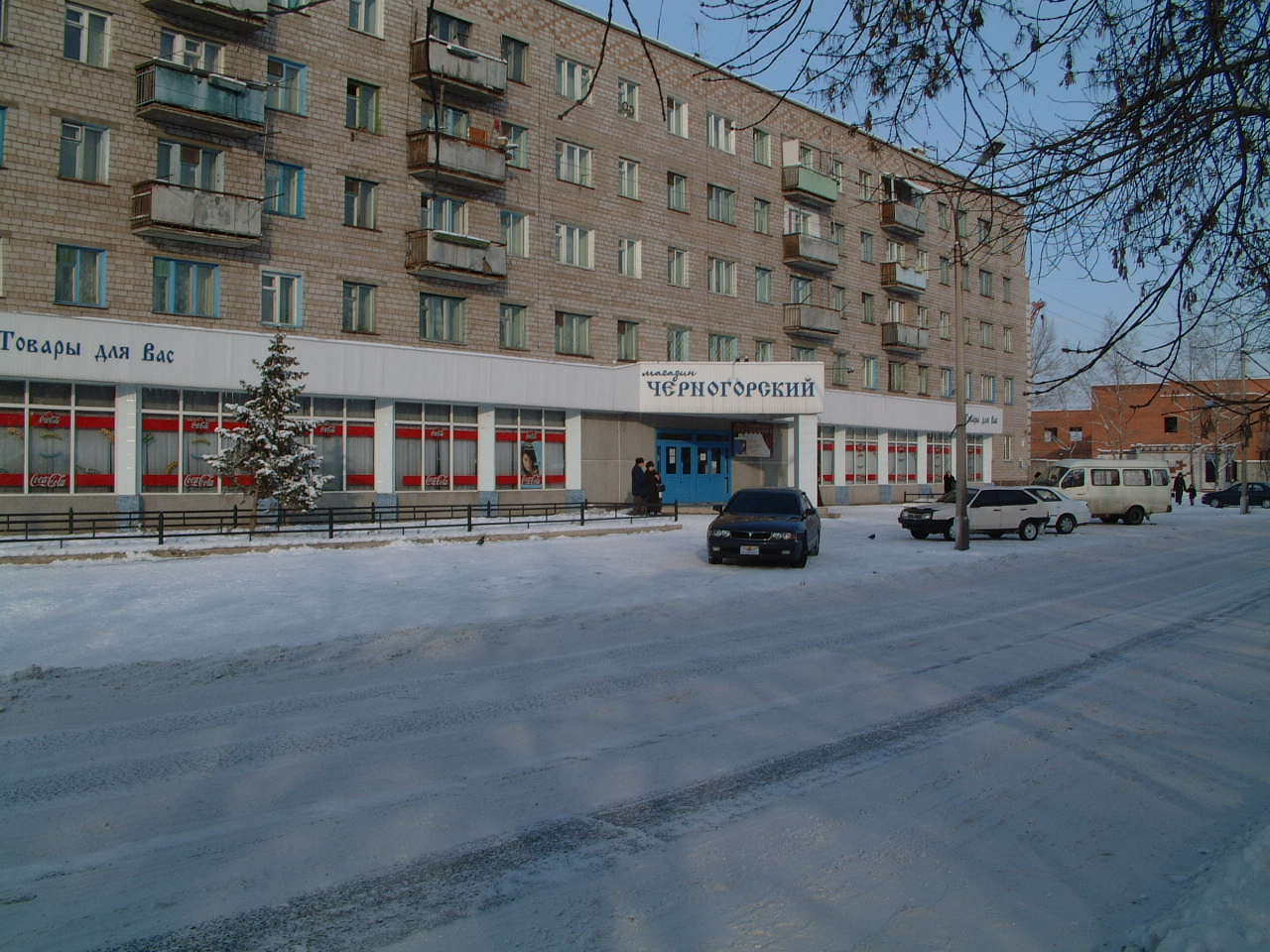 Магазин Черногорский